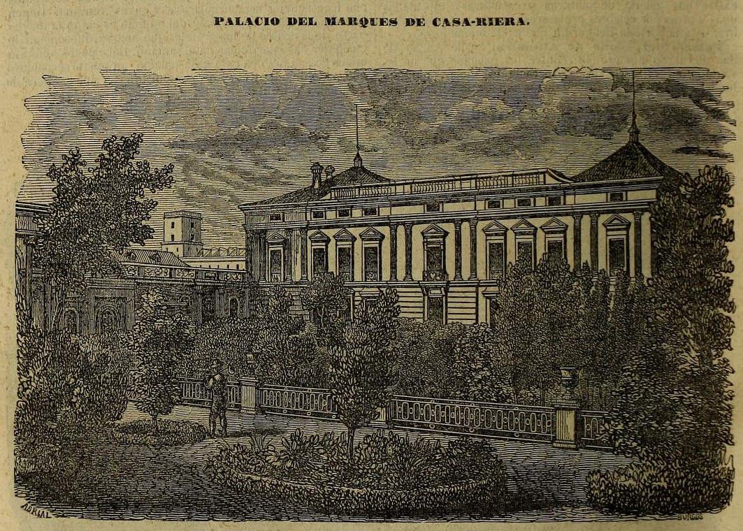 Palacio del Marqués de Casa Riera hacia mediados del siglo XIX, Madrid, España.